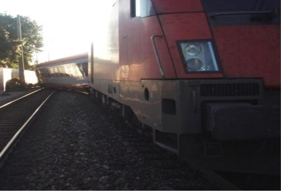 Am 28. September 2012 engleiste zwischen dem Wiener Westbahnhof und Penzing die Lokomotive Baureihe 1116 und der erste Wagen eines nach Salzburg fahrenden Intercitys. Reisende und Zugspersonal bleiben unverletzt, aber es kam zu erheblichen Sachschäden. Die Entgleisung wurde durch Einschalten eines Ersatzsignals ohne ausreichende Fahrstraßenprüfung verursacht. Kurz vor dem Befahren des Zugs wurde eine Weiche umgestellt. Das Stellwerk war wegen einer technischen Störung nur eingeschränkt benutzbar.